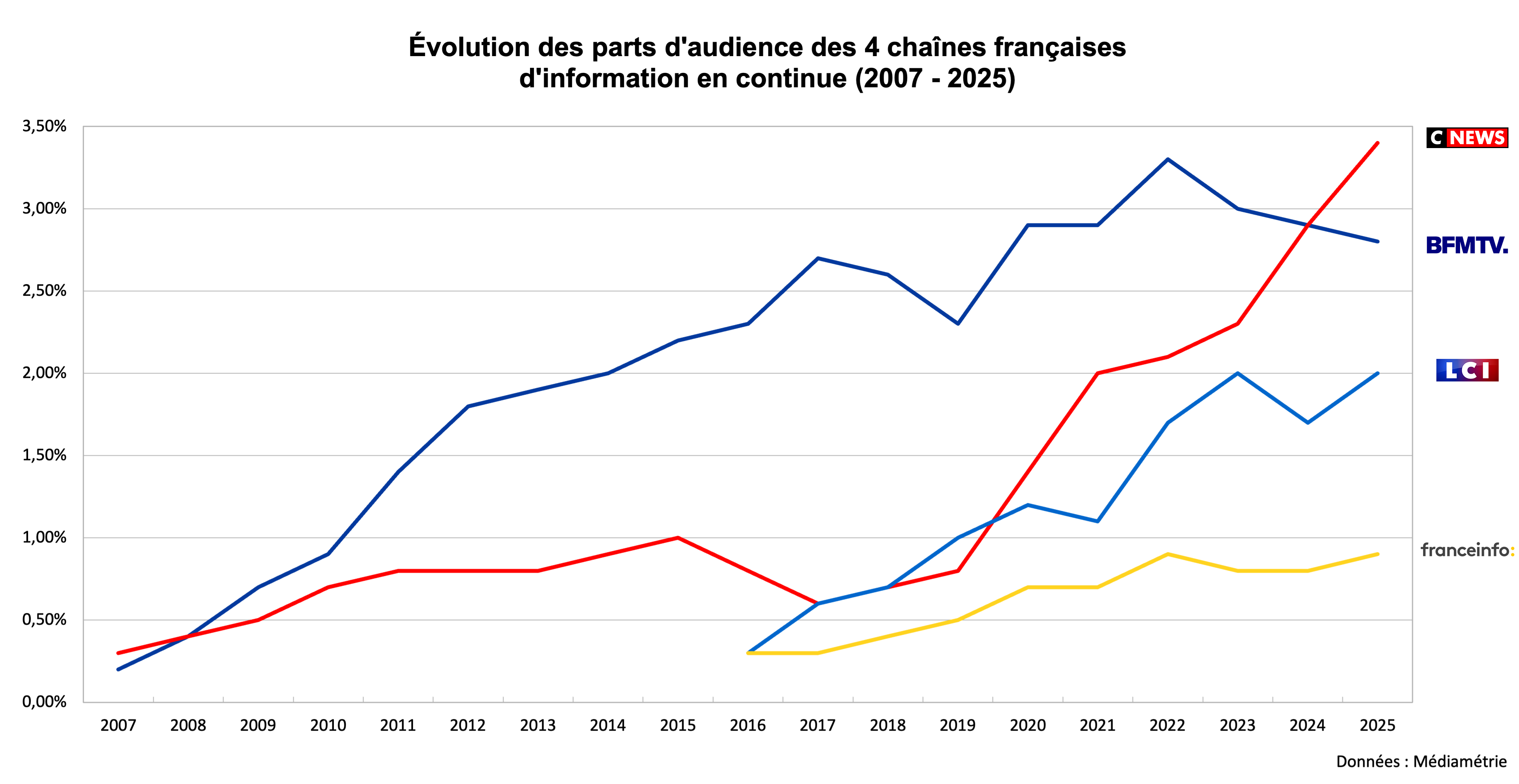 Évolution des audiences des 4 chaînes d'informations en France